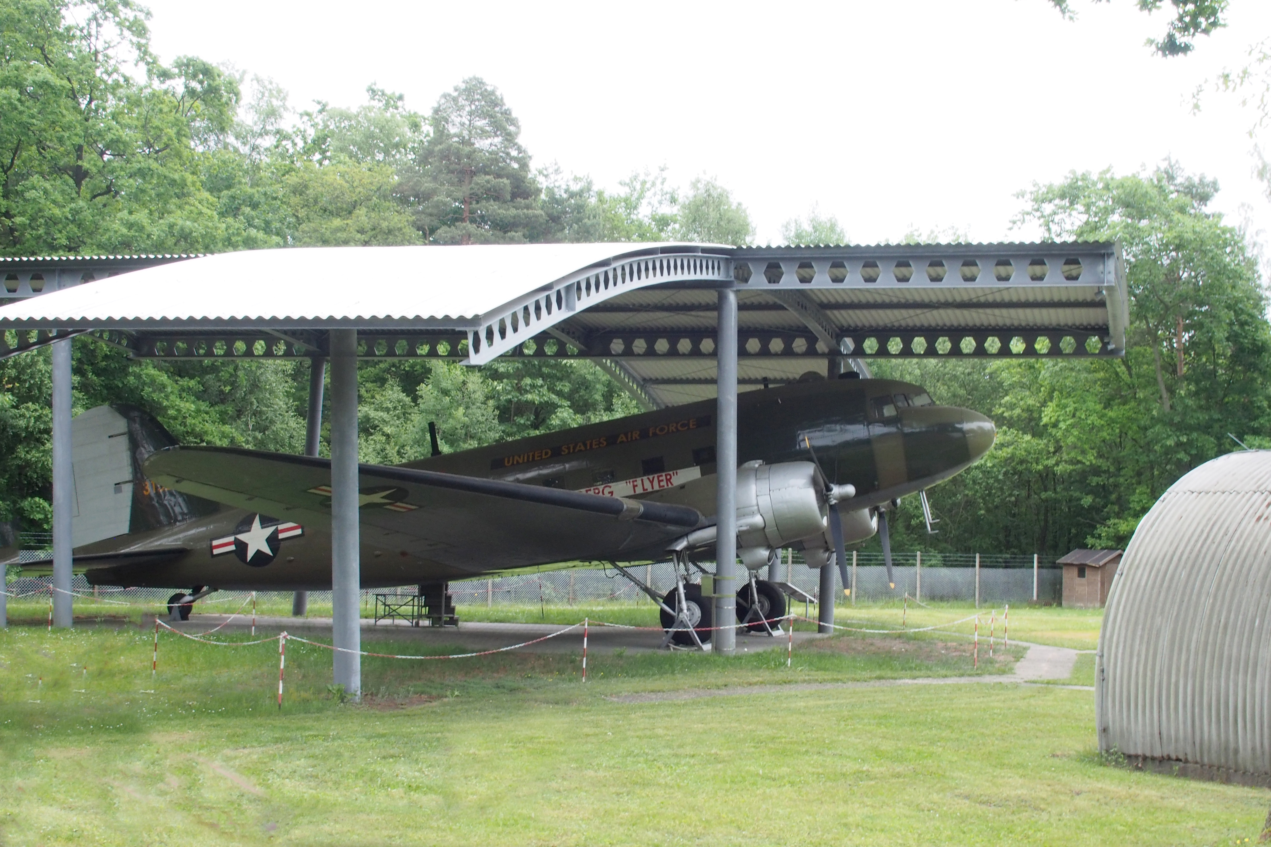 Museumsgelände der Erinnerungsstätte Berliner Luftbrücke mit C-47 (Faßberg Flyer) der US-Airforce